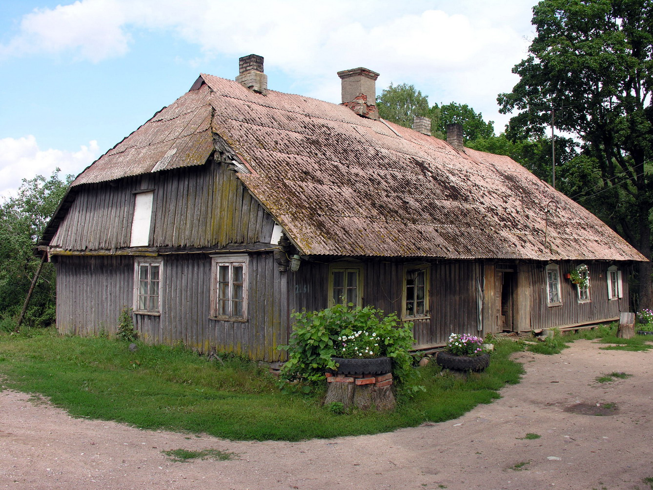 Žemaitėška: Žemaitėška truoba Puortegrapėjė Algėrda, 2006 metās rugpjūtė ontra dėina